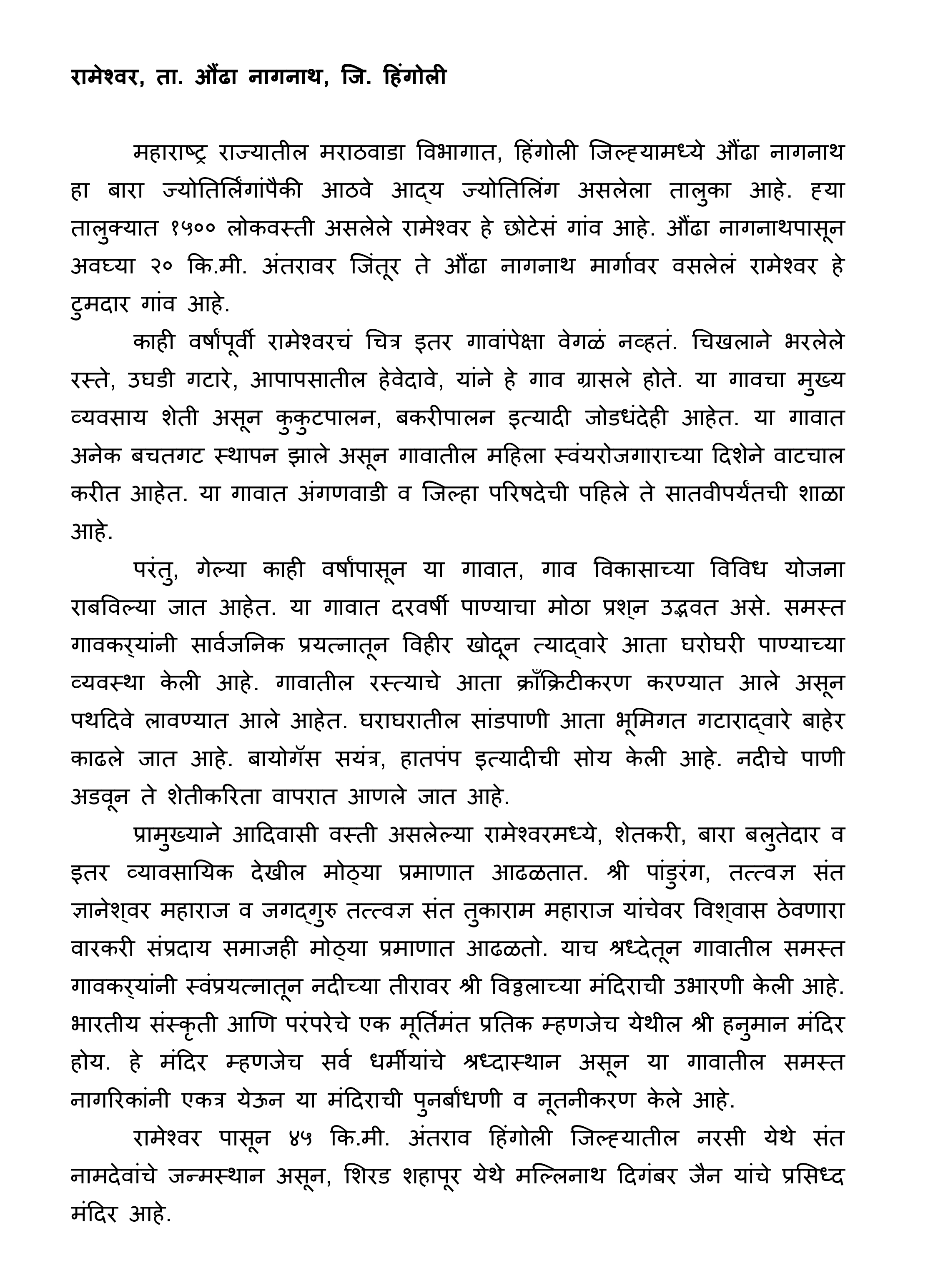 रामेश्वर, ता. औंढा नागनाथ, जि. हिंगोली महाराष्ट्र राज्यातील मराठवाडा विभागात, हिंगोली जिल्ह्यामध्ये औंढा नागनाथ हा बारा ज्योतिर्लिंगांपैकी आठवे आद्य ज्योतिलिंग असलेला तालुका आहे. ह्या तालुक्यात १५०० लोकवस्ती असलेले रामेश्वर हे छोटेसं गांव आहे. औंढा नागनाथपासून अवघ्या २० कि.मी. अंतरावर जिंतूर ते औंढा नागनाथ मार्गावर वसलेलं रामेश्वर हे टुमदार गांव आहे. काही वर्षांपूर्वी रामेश्वरचं चित्र इतर गावांपेक्षा वेगळं नव्हतं. चिखलाने भरलेले रस्ते, उघडी गटारे, आपापसातील हेवेदावे, यांने हे गाव ग्रासले होते. या गावचा मुख्य व्यवसाय शेती असून कुकुटपालन, बकरीपालन इत्यादी जोडधंदेही आहेत. या गावात अनेक बचतगट स्थापन झाले असून गावातील महिला स्वंयरोजगाराच्या दिशेने वाटचाल करीत आहेत. या गावात अंगणवाडी व जिल्हा परिषदेची पहिले ते सातवीपर्यंतची शाळा आहे. परंतु, गेल्या काही वर्षांपासून या गावात, गाव विकासाच्या विविध योजना राबविल्या जात आहेत. या गावात दरवर्षी पाण्याचा मोठा प्रश्न उद्भवत असे. समस्त गावकर्यांनी सार्वजनिक प्रयत्नातून विहीर खोदून त्याद्वारे आता घरोघरी पाण्याच्या व्यवस्था केली आहे. गावातील रस्त्याचे आता क्राँक्रिटीकरण करण्यात आले असून पथदिवे लावण्यात आले आहेत. घराघरातील सांडपाणी आता भूमिगत गटाराद्वारे बाहेर काढले जात आहे. बायोगॅस सयंत्र, हातपंप इत्यादीची सोय केली आहे. नदीचे पाणी अडवून ते शेतीकरिता वापरात आणले जात आहे. प्रामुख्याने आदिवासी वस्ती असलेल्या रामेश्वरमध्ये, शेतकरी, बारा बलुतेदार व इतर व्यावसायिक देखील मोठ्या प्रमाणात आढळतात. श्री पांडुरंग, तत्त्वज्ञ संत ज्ञानेश्वर महाराज व जगद्गुरु तत्त्वज्ञ संत तुकाराम महाराज यांचेवर विश्वास ठेवणारा वारकरी संप्रदाय समाजही मोठ्या प्रमाणात आढळतो. याच श्रध्देतून गावातील समस्त गावकर्यांनी स्वंप्रयत्नातून नदीच्या तीरावर श्री विठ्ठलाच्या मंदिराची उभारणी केली आहे. भारतीय संस्कृती आणि परंपरेचे एक मूर्तिमंत प्रतिक म्हणजेच येथील श्री हनुमान मंदिर होय. हे मंदिर म्हणजेच सर्व धर्मीयांचे श्रध्दास्थान असून या गावातील समस्त नागरिकांनी एकत्र येऊन या मंदिराची पुनर्बांधणी व नूतनीकरण केले आहे. रामेश्वर पासून ४५ कि.मी. अंतराव हिंगोली जिल्ह्यातील नरसी येथे संत नामदेवांचे जन्मस्थान असून, शिरड शहापूर येथे मल्लिनाथ दिगंबर जैन यांचे प्रसिध्द मंदिर आहे.